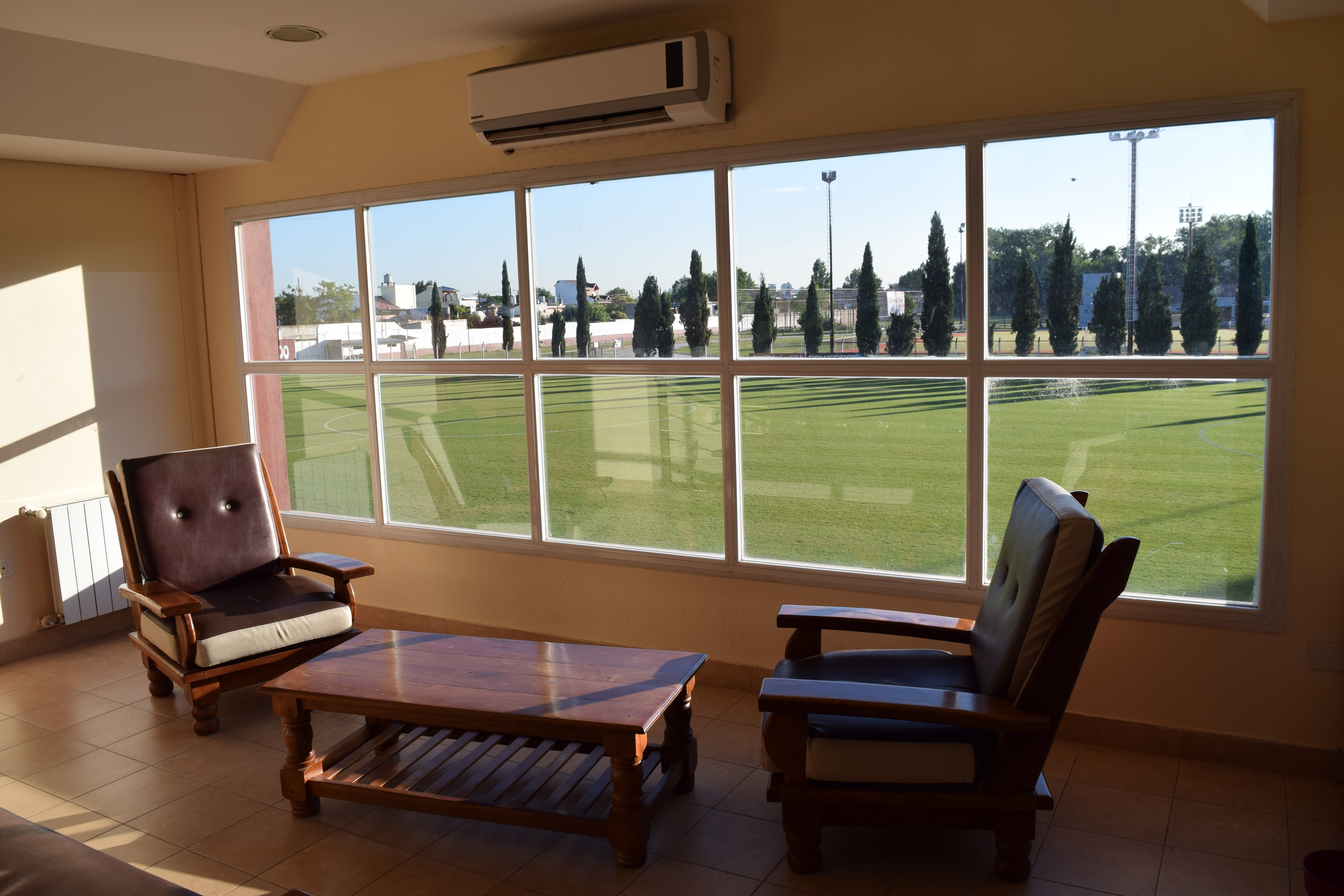 Hall central de la pensión de juveniles, ubicada debajo de la tribuna sur del estadio. Se aprecia la vista de la cancha de fútbol amateur.